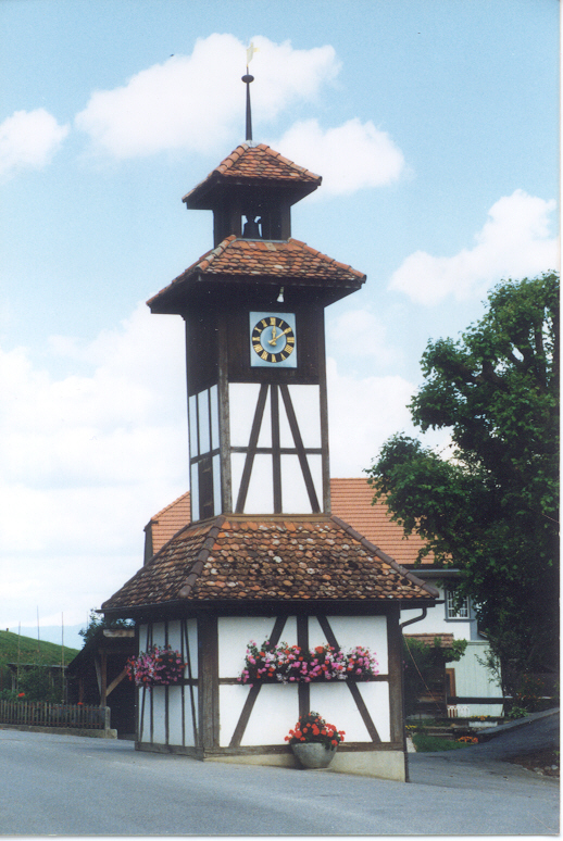 Lindenzytli, beherbergt das Glöcklein von 1495 des ehemaligen Cluniazenser-Priorats in Hettiswil.